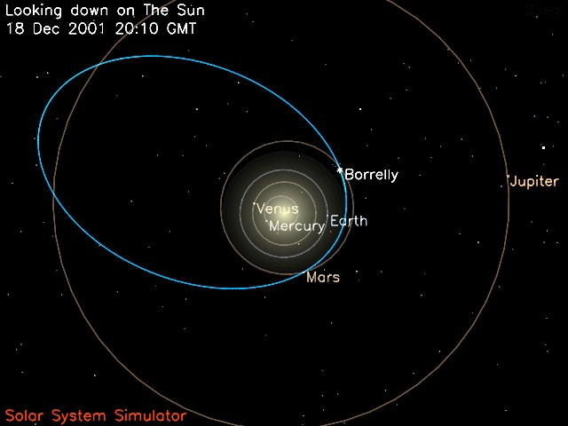 kometa